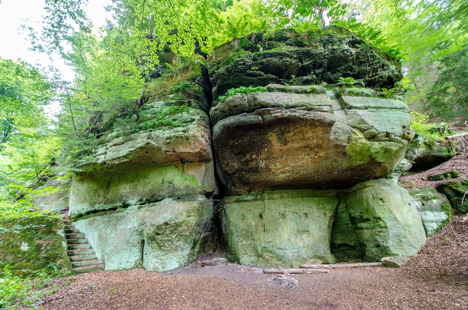 Marksteine im Wald zwischen Helsen, Schmillinghausen und Külte